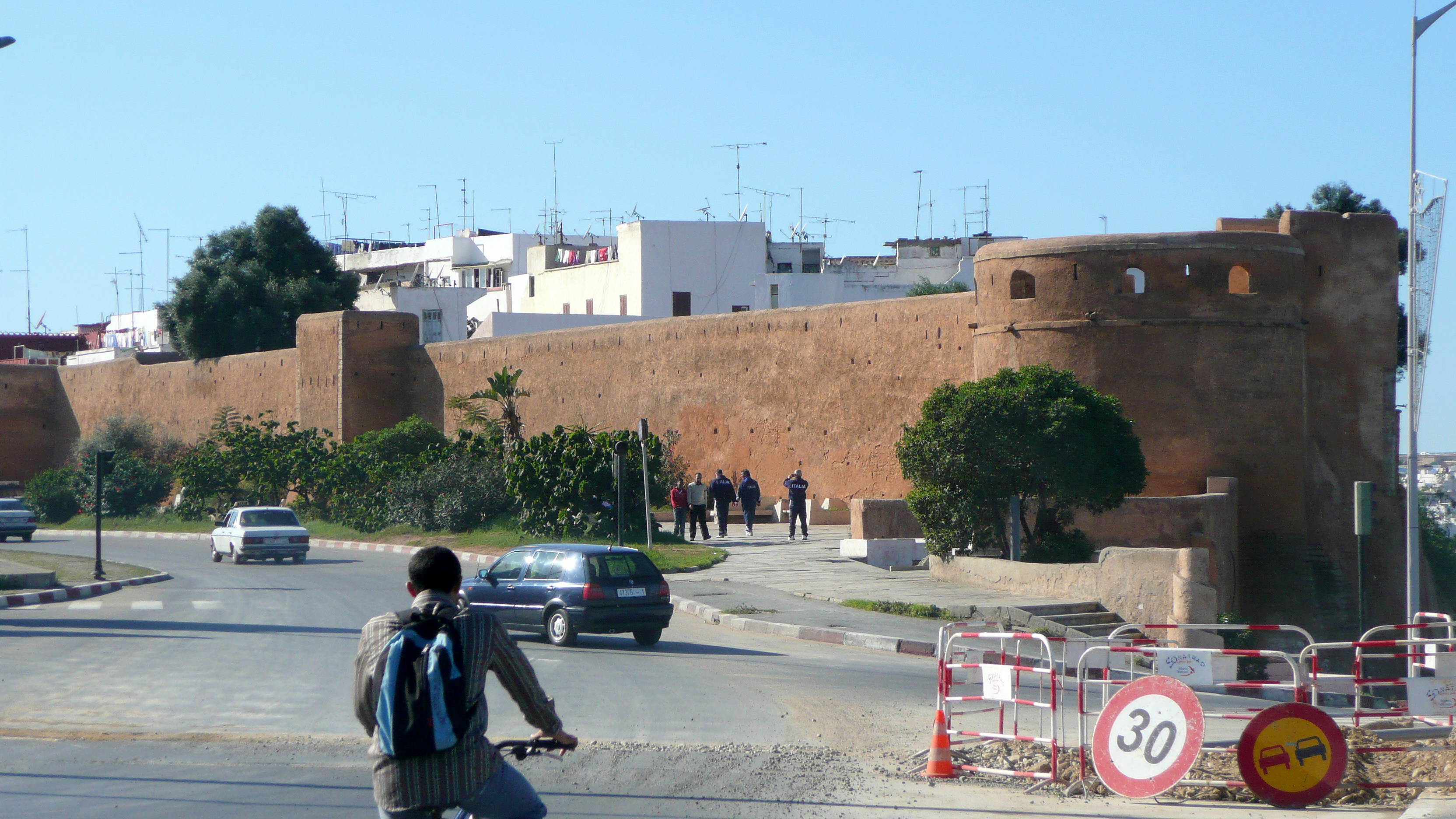 Angle de l'enceinte de la Medina de Rabat (Maroc)